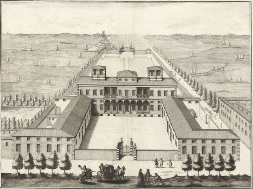 Villa Silva in un'incisione di Karl Remshart